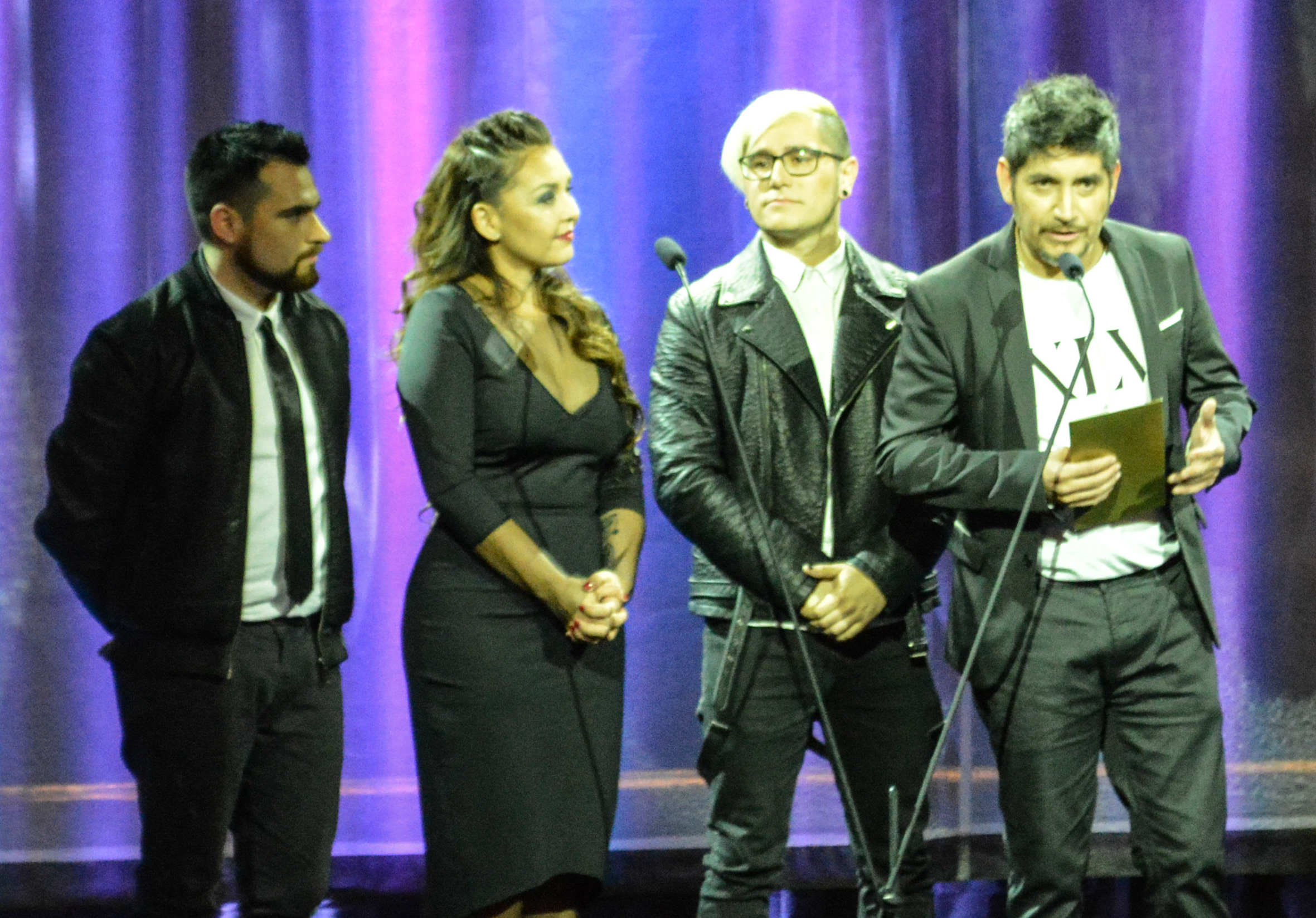 Saiko en los premios Pulsar 2017, entregando el premio al mejor artista Pop, imagen recortada de la imagen original.